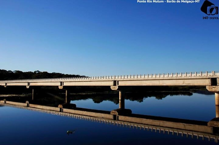 esta foto e da Ponto do rio Mutum na cidade de Barao de Melgaço Pantanal do MT